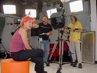 Ruth infarinato at mtv latino studios